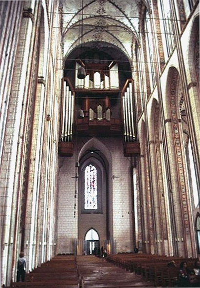 Lübeck Maria Kirke i Sydslesvig. Skibet set mod vest